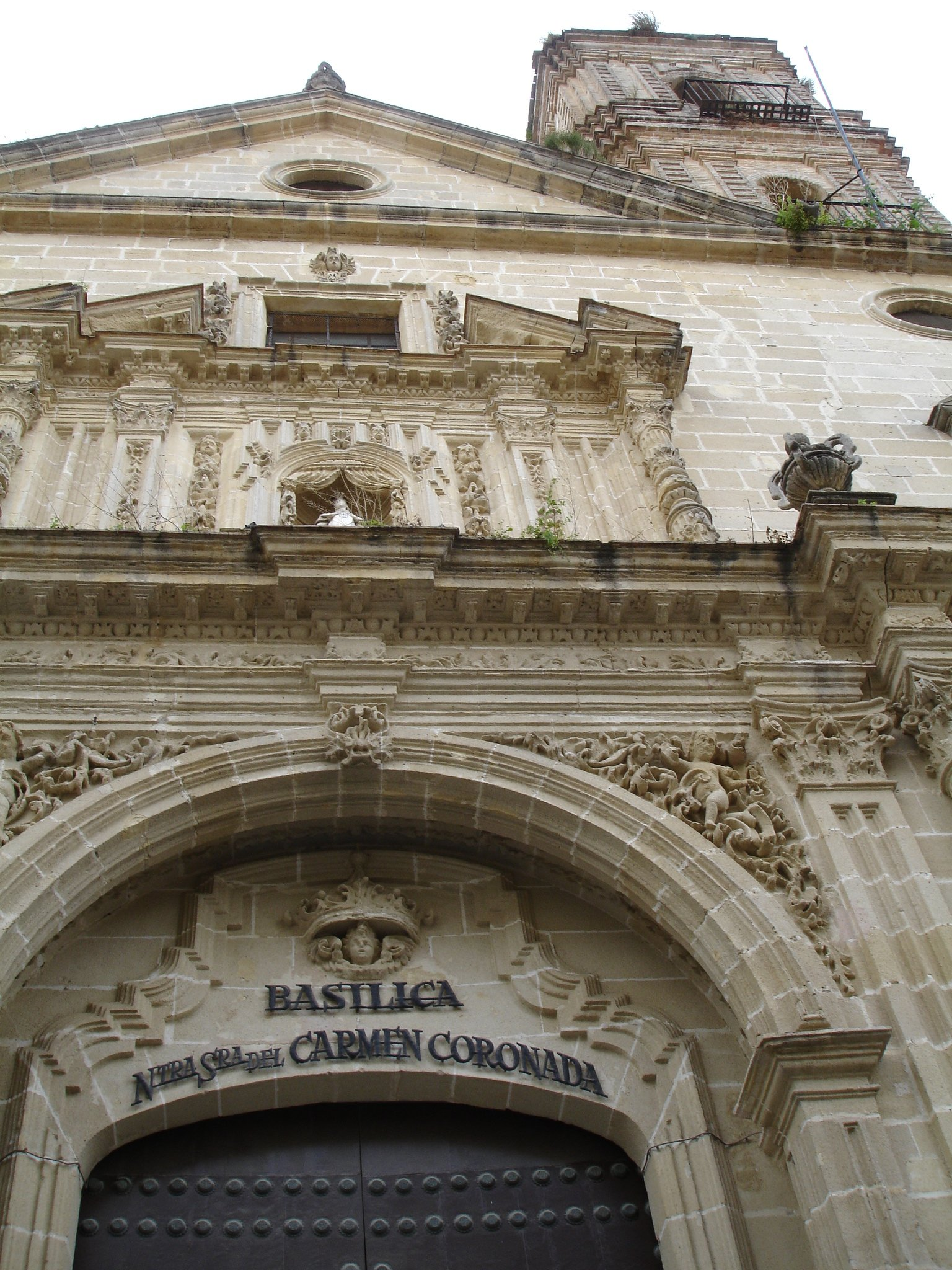 Iglesia del Carmen, Jerez (SPAIN)